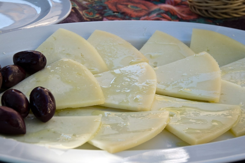 Ovčji sir